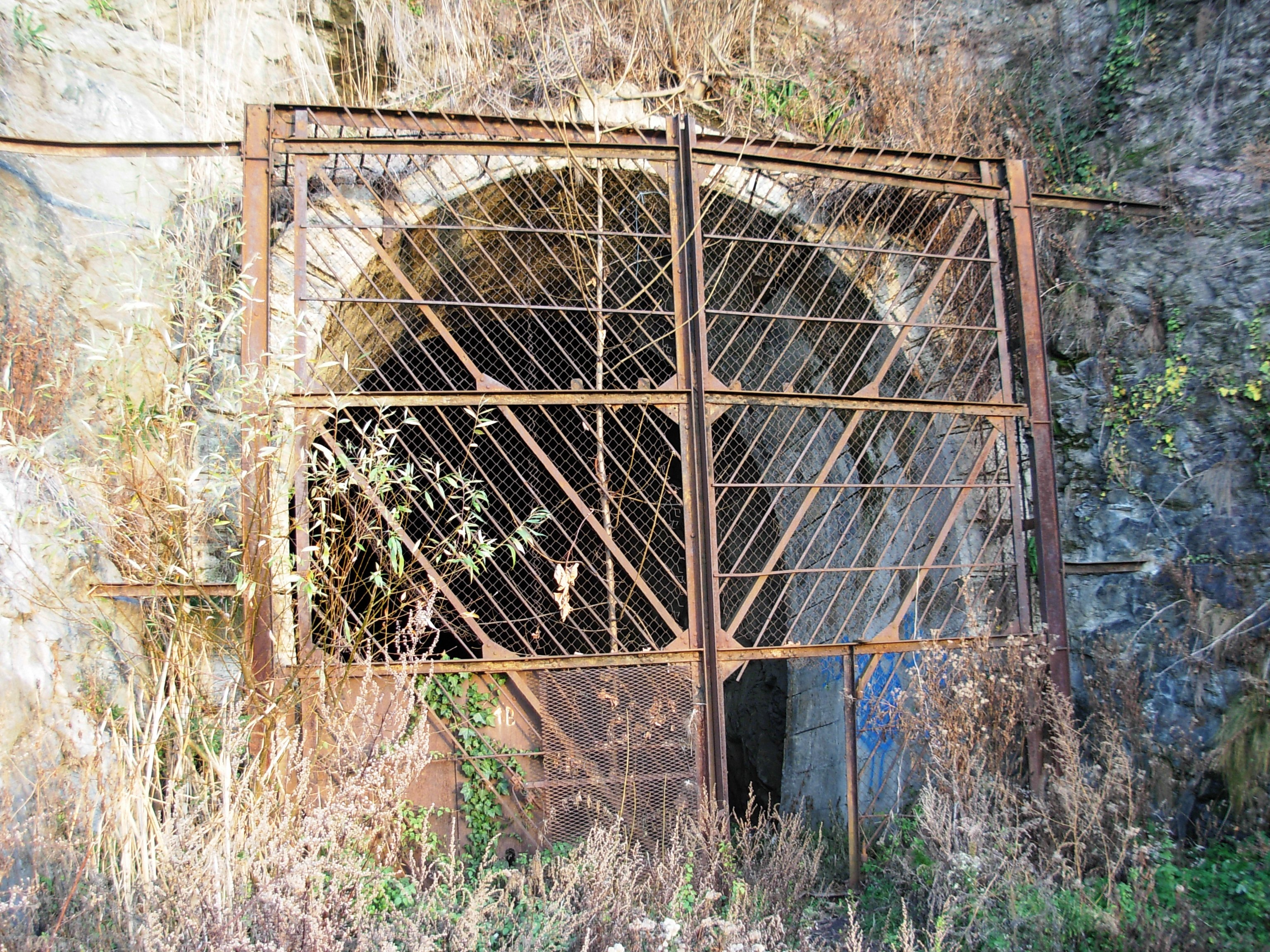 Ulaz u tunel ispod Petrovaradinske tvrđave, januar 2012.